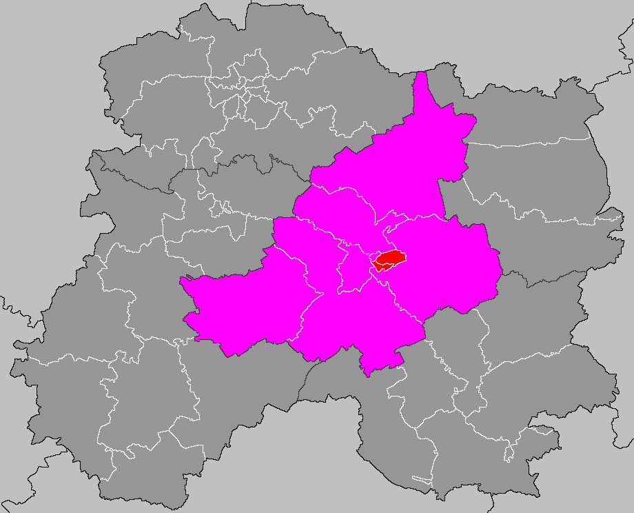 Localisation du canton de Châlons-en-Champagne-4